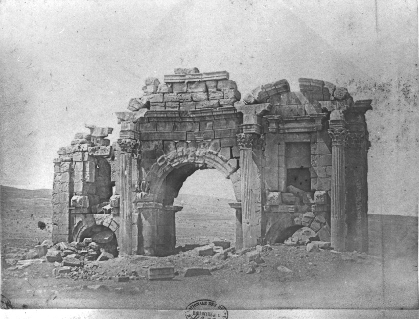 Arc de triomphe de Thamugas cercle de Batna. 25 février 1880